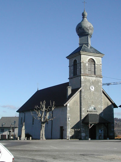 Eglise de Cuvat commune de haute savoie